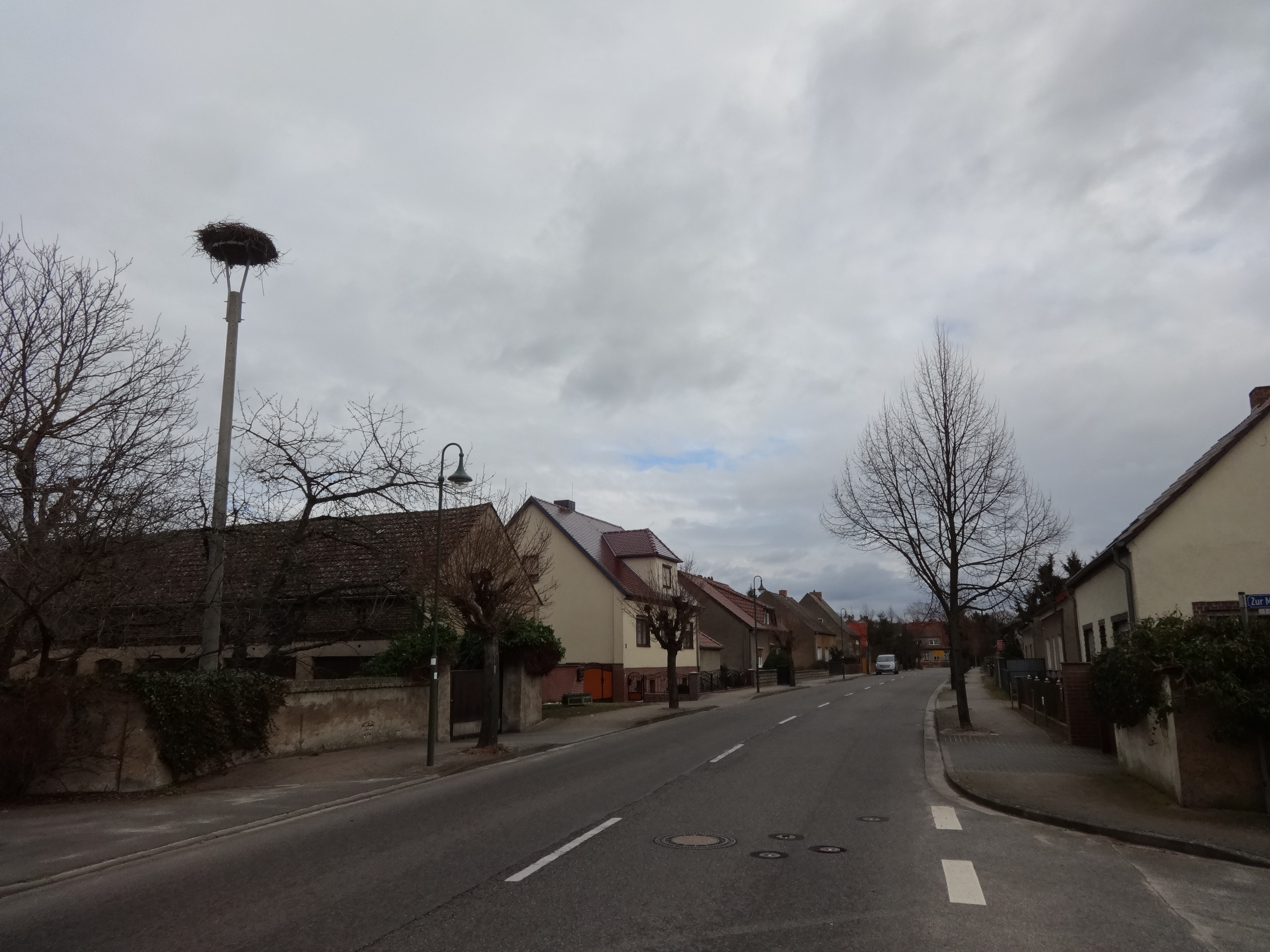 Hohenbrück, ein Ortsteil der Gemeinde Märkische Heide in Brandenburg